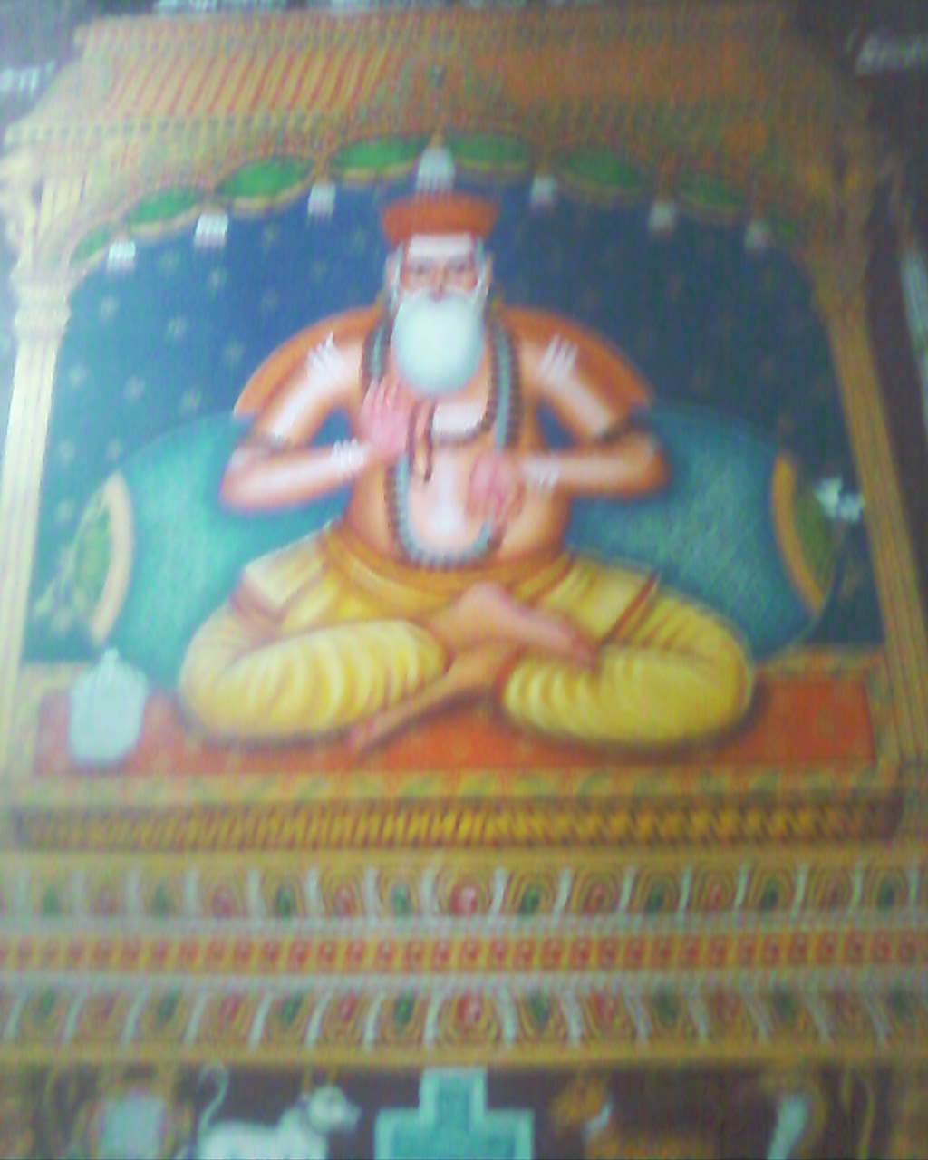 மடவார்வளாகம் வைத்தியநாதசுவாமி கோயில் கோபுர வாயிலில் குருஞான சம்பந்தர் ஓவியம்